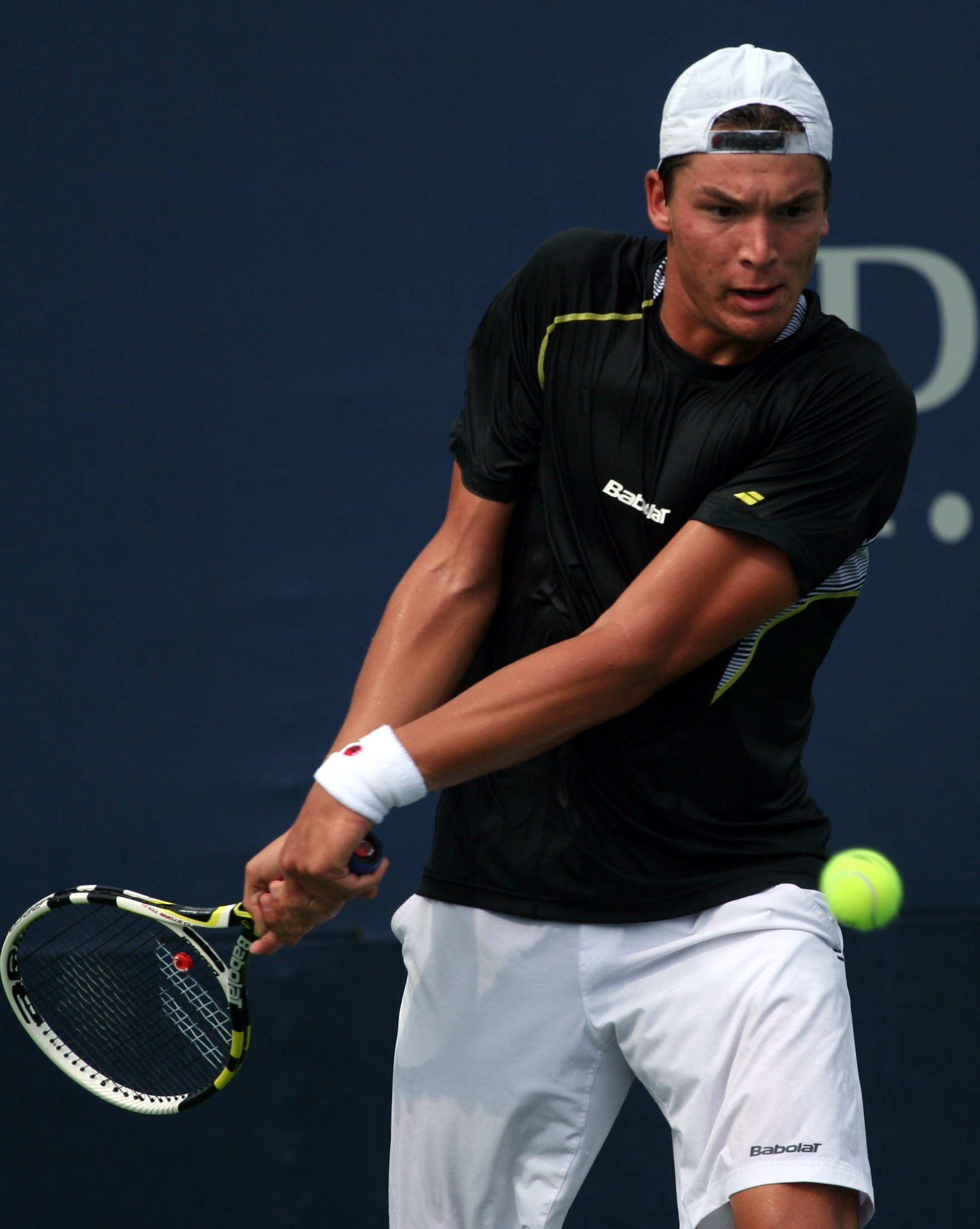 Sunday, Sept. 1, 2013